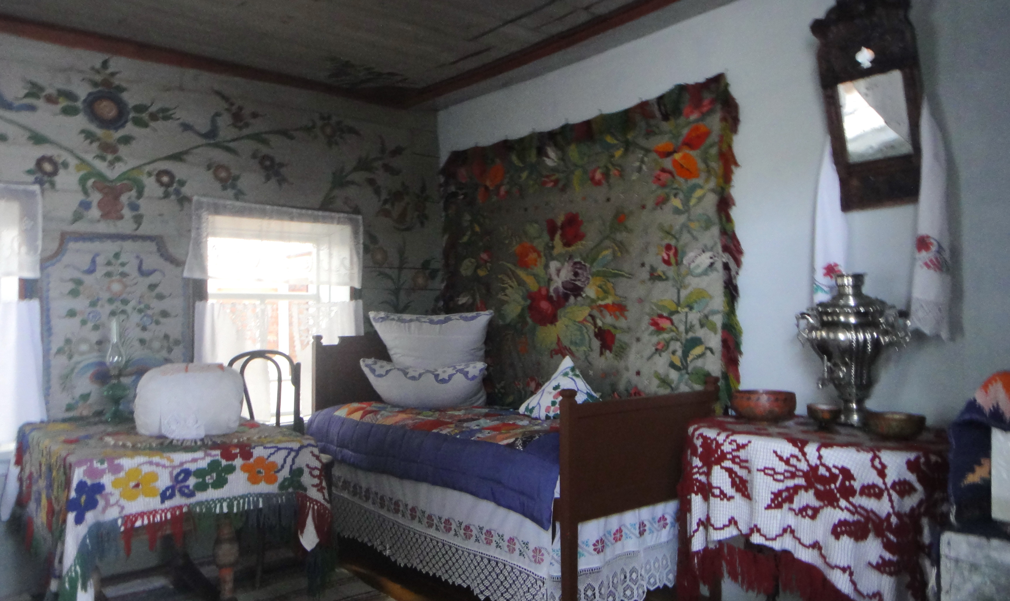 Музей народного деревянного зодчества под открытым небом: экспозиция музея деревянной росписи в крестьянской избе из села Мезень(Свердловская область, Алапаевск, село Нижняя Синячиха)